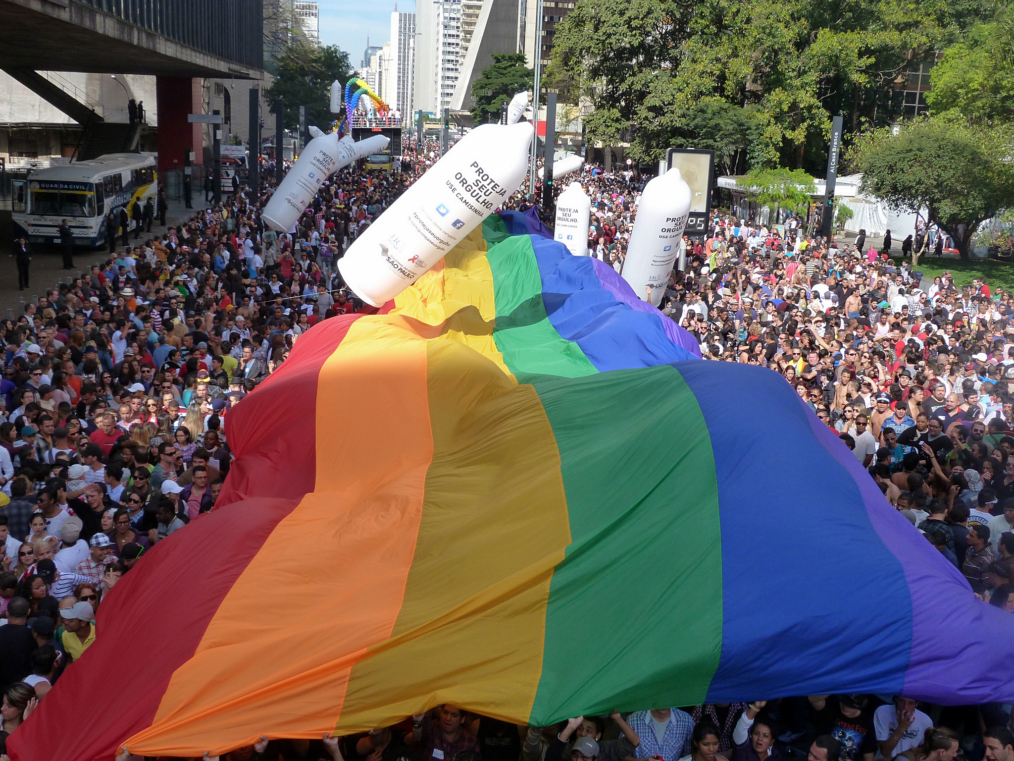 16ª Parada do Orgulho Gay de São Paulo, Brasil.